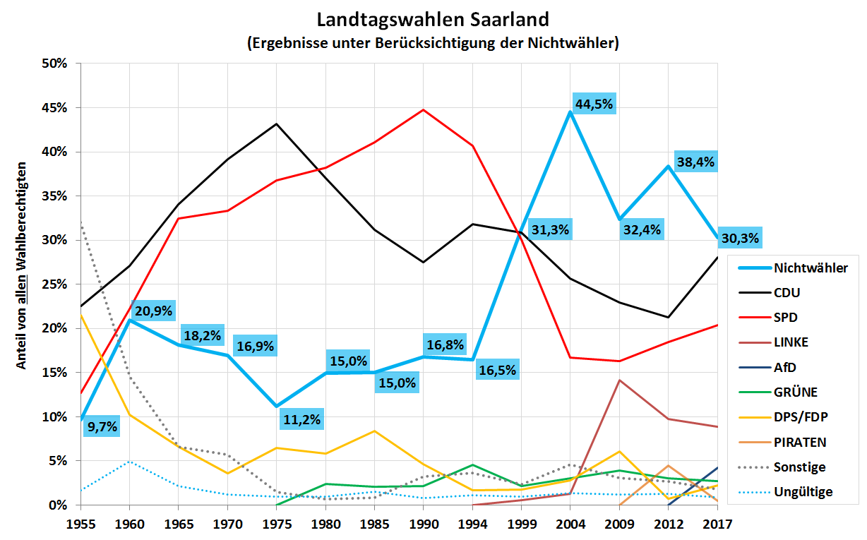 Historie des Anteils der Nichtwähler bei den Landtagswahlen im Saarland